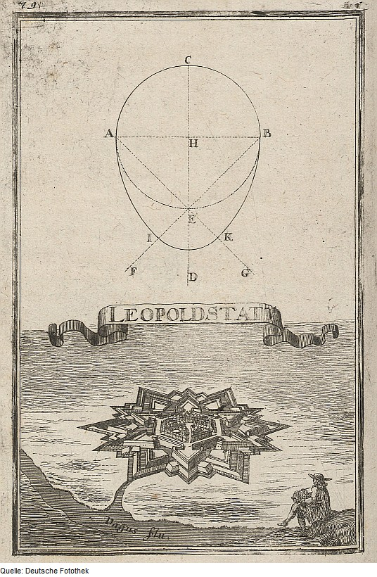 Original image description from the Deutsche FotothekGeometrie & Architektur & Festungsbau & Vermessung